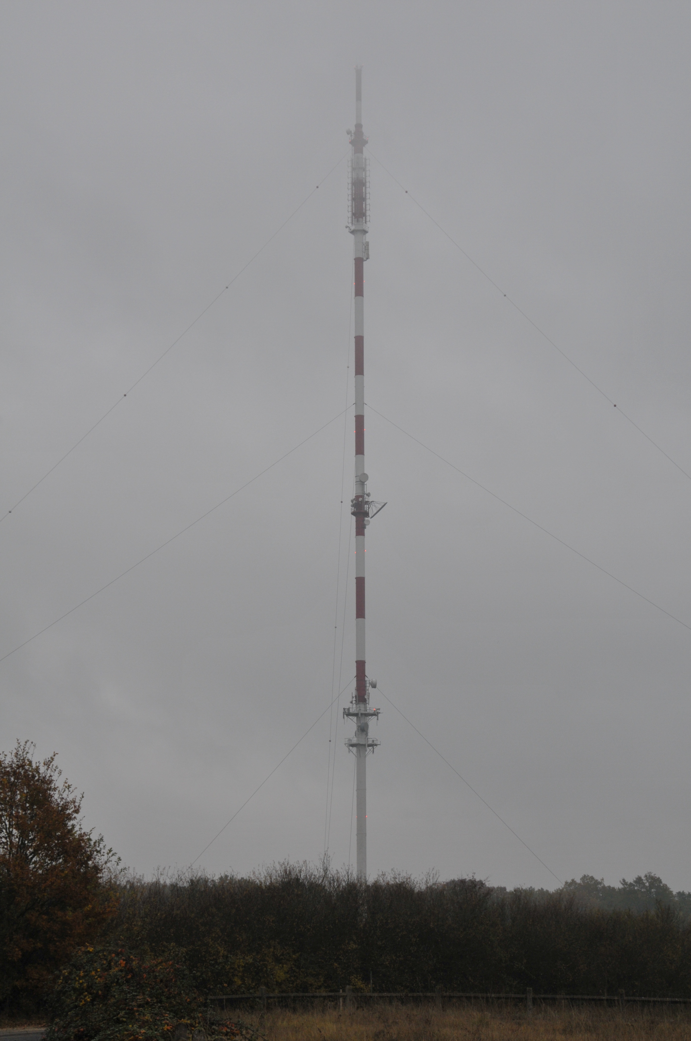 Category:Émetteur TDF de Traînou, Loiret (45), France